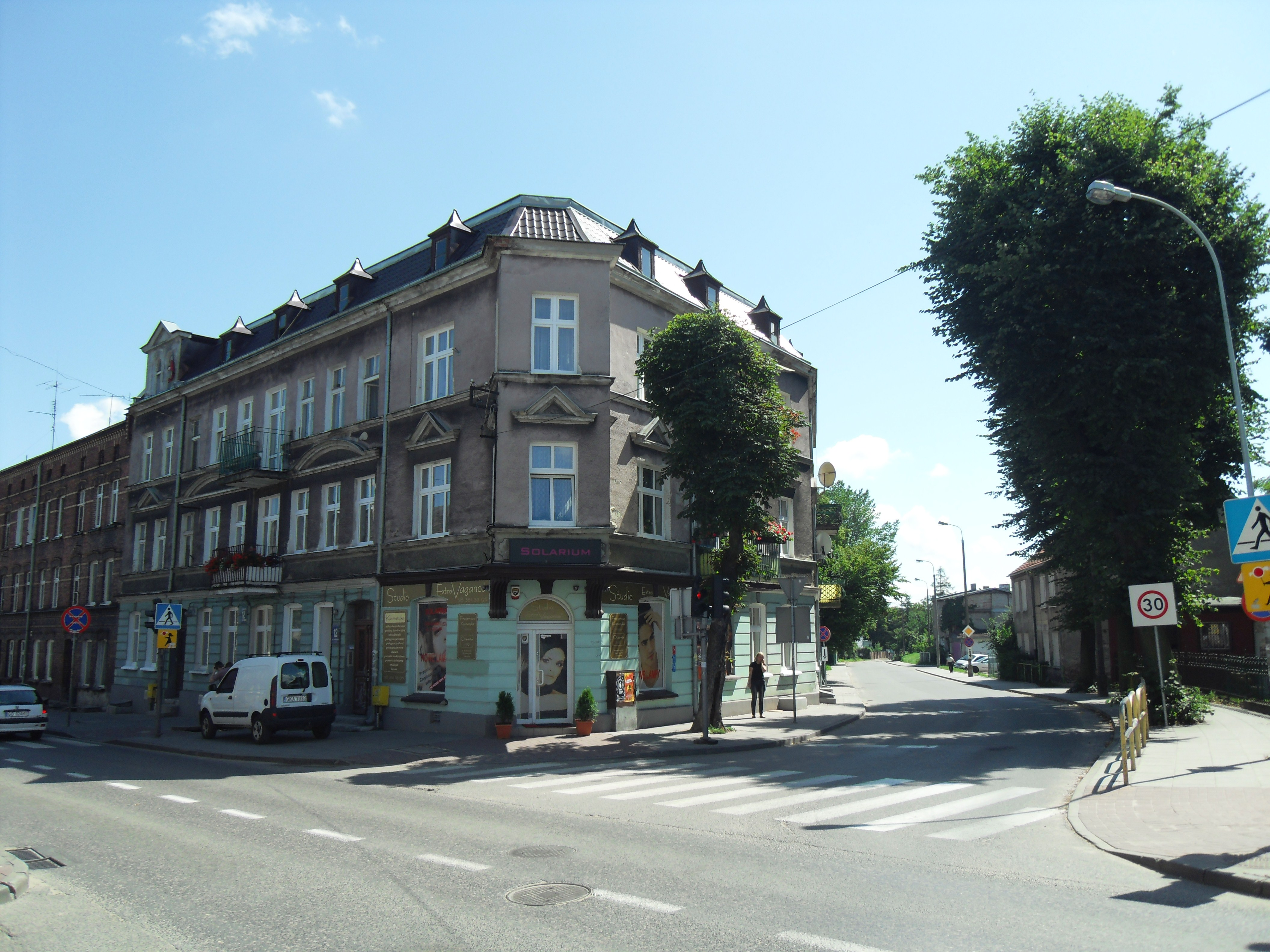 Gdańsk Orunia, ulica Raduńska.